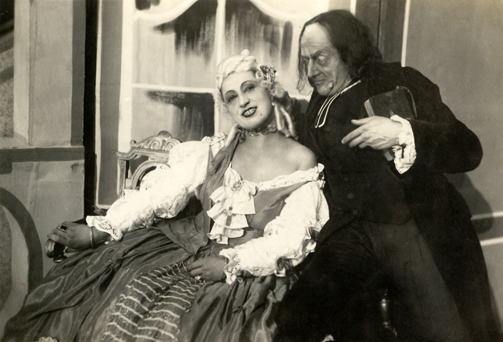 Jean-Baptiste Poquelin Molière, Tartuffe, Narodno gledališče v Mariboru. Maks Furijan (Tartuffe), Ema Starc (Elmira).